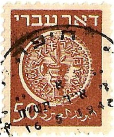 בול "דואר עברי" (דאר עברי). ע"נ 50 מיל.